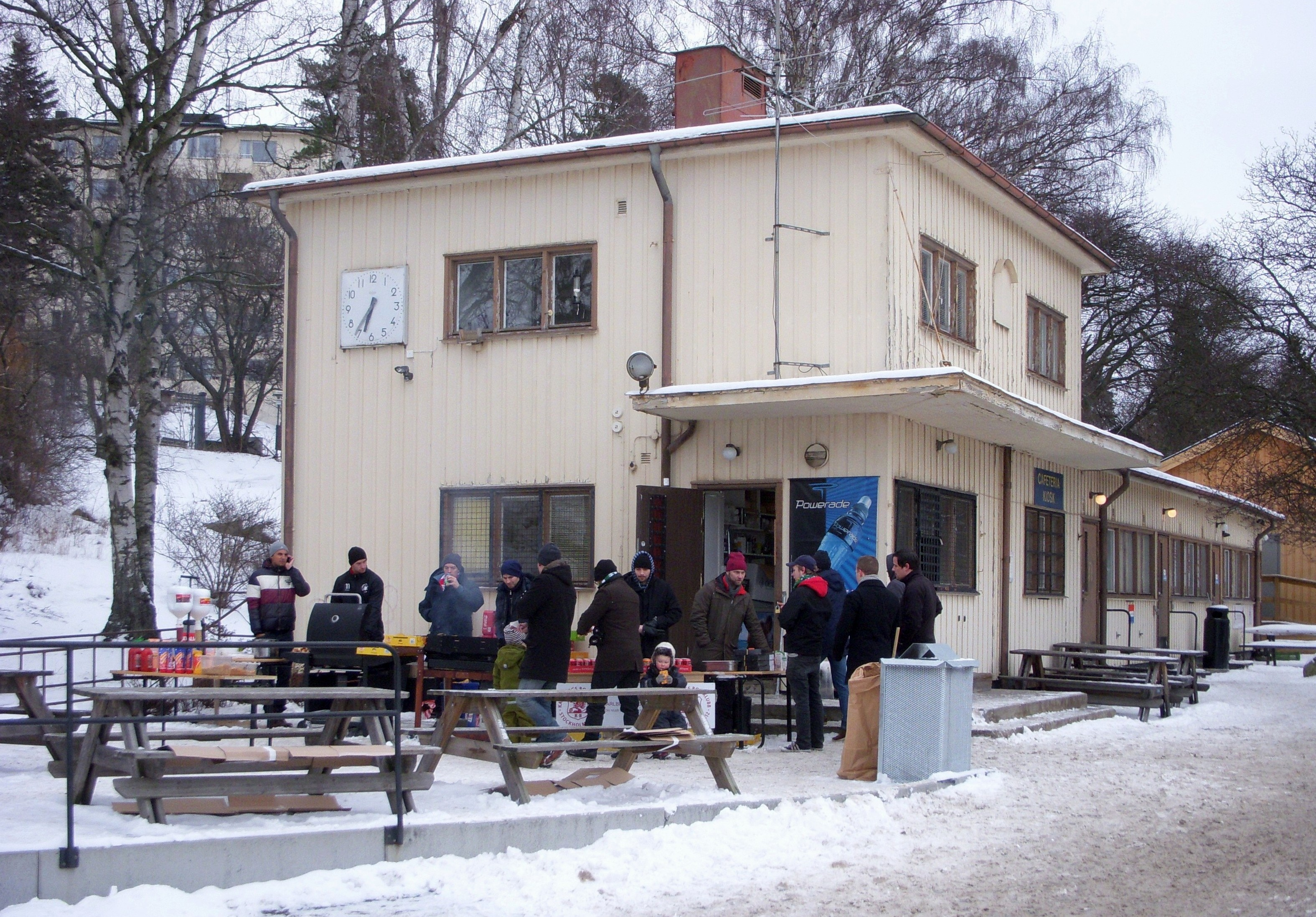 Stadshagens IP (Idrotts Plats), servering och omklädnad